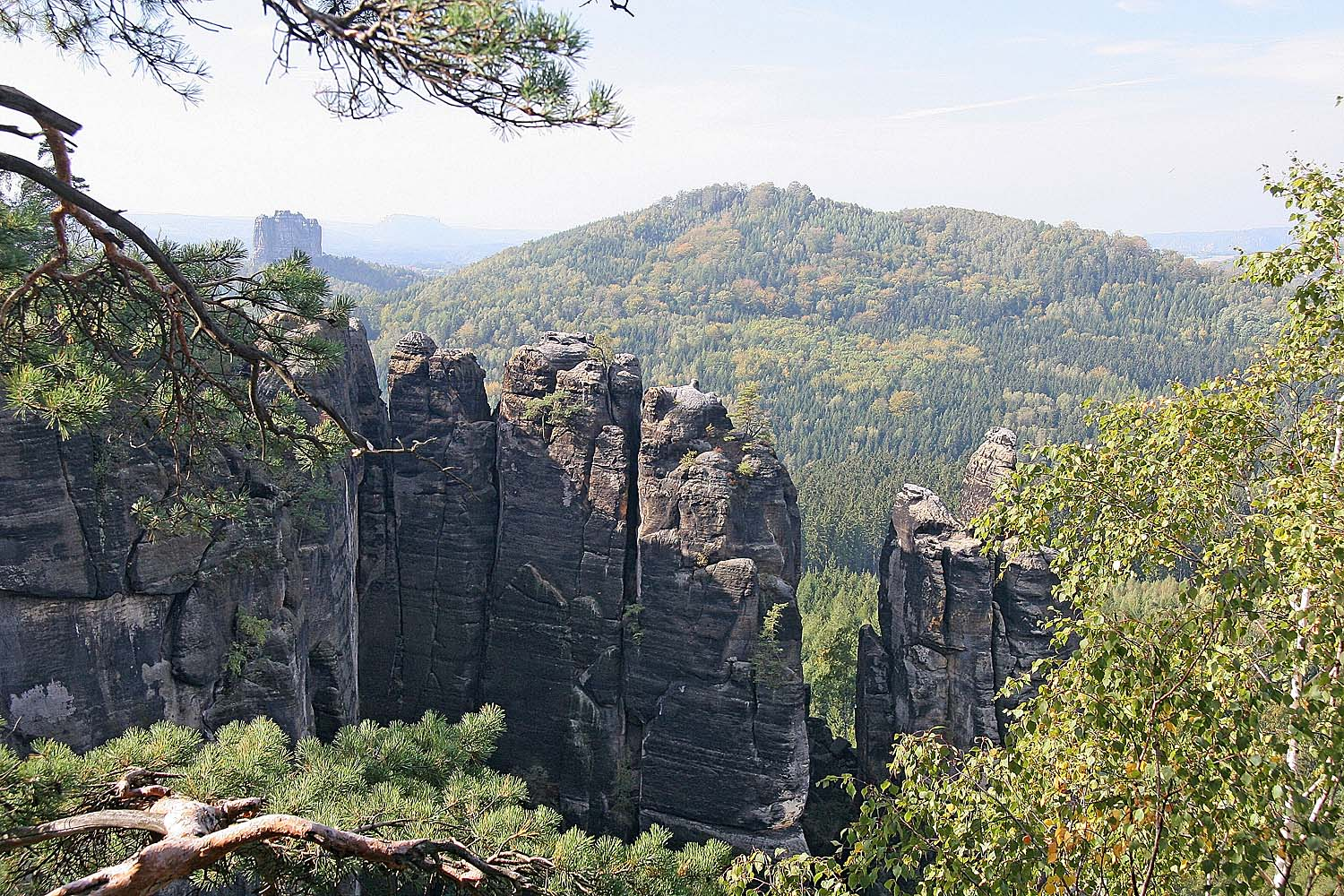 Affensteine in Saxony Switzeland autor: Prazak date: 11. 10. 2006